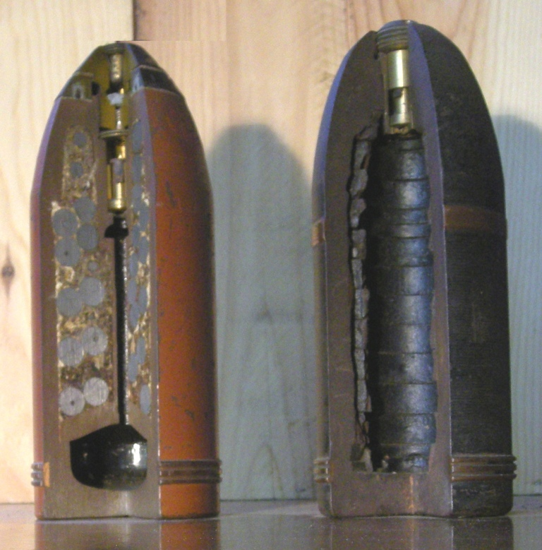 75 mm Granaten